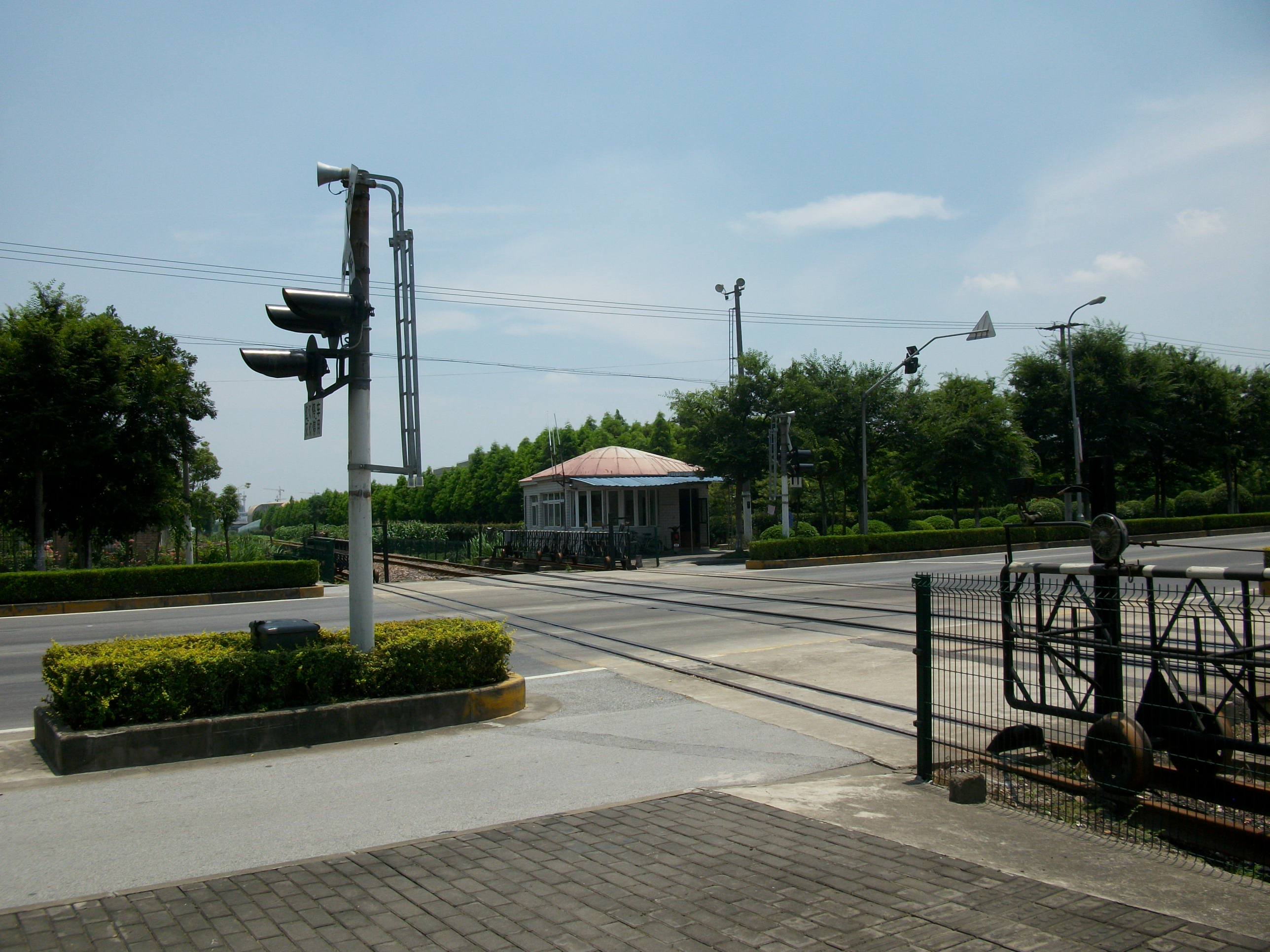 吴周铁路浦西部分，今上粮七库专用线。